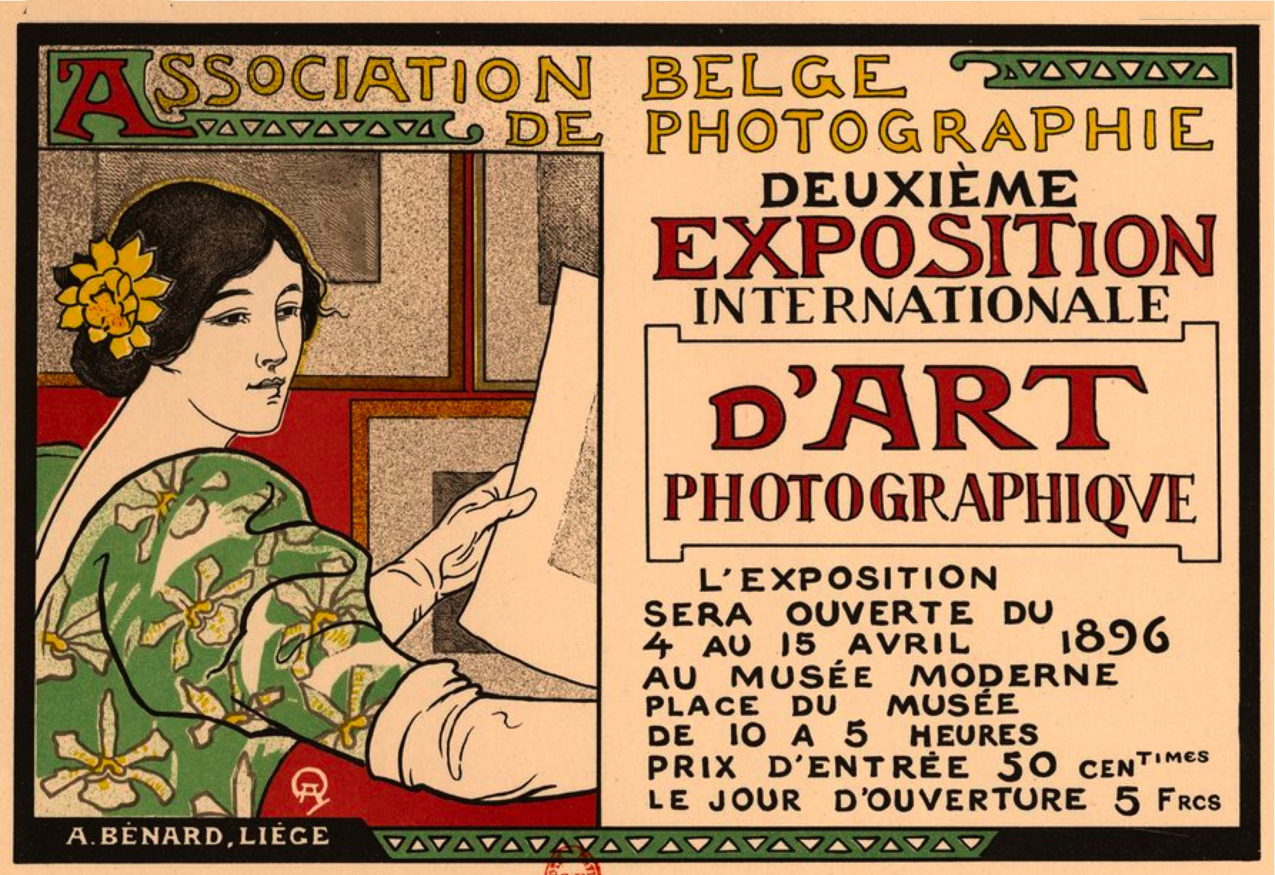 Lithographic fac simile poster of Association belge photographique deuxième exposition internationale d'art photographique (A. Bénard, printer).